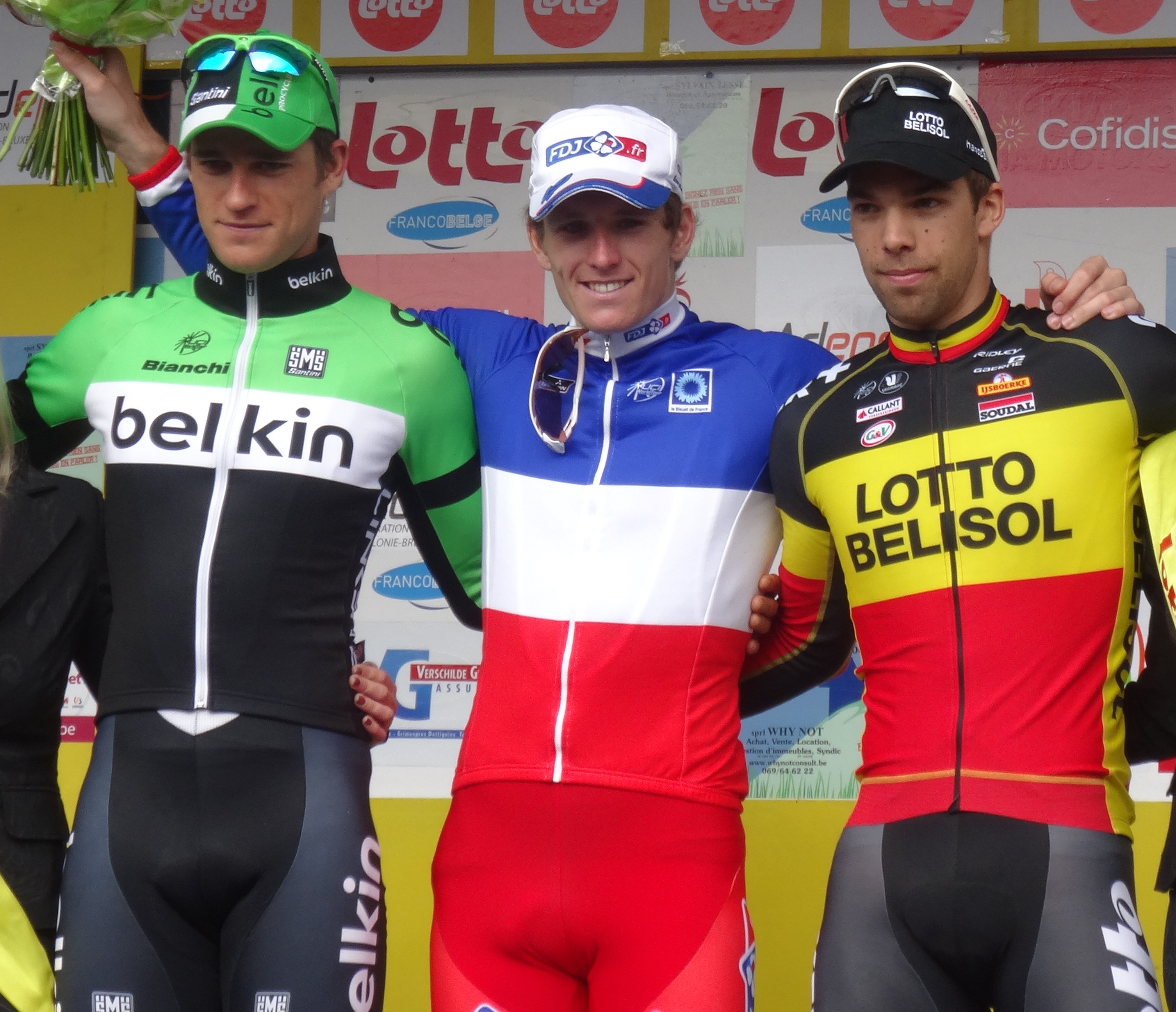 Reportage photographique réalisé le dimanche 5 octobre à l'occasion de l'arrivée de la quatrième étape de l'Eurométropole Tour 2014 à Tournai, Belgique.